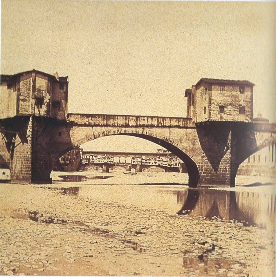 Ponte alle grazie, 1860s